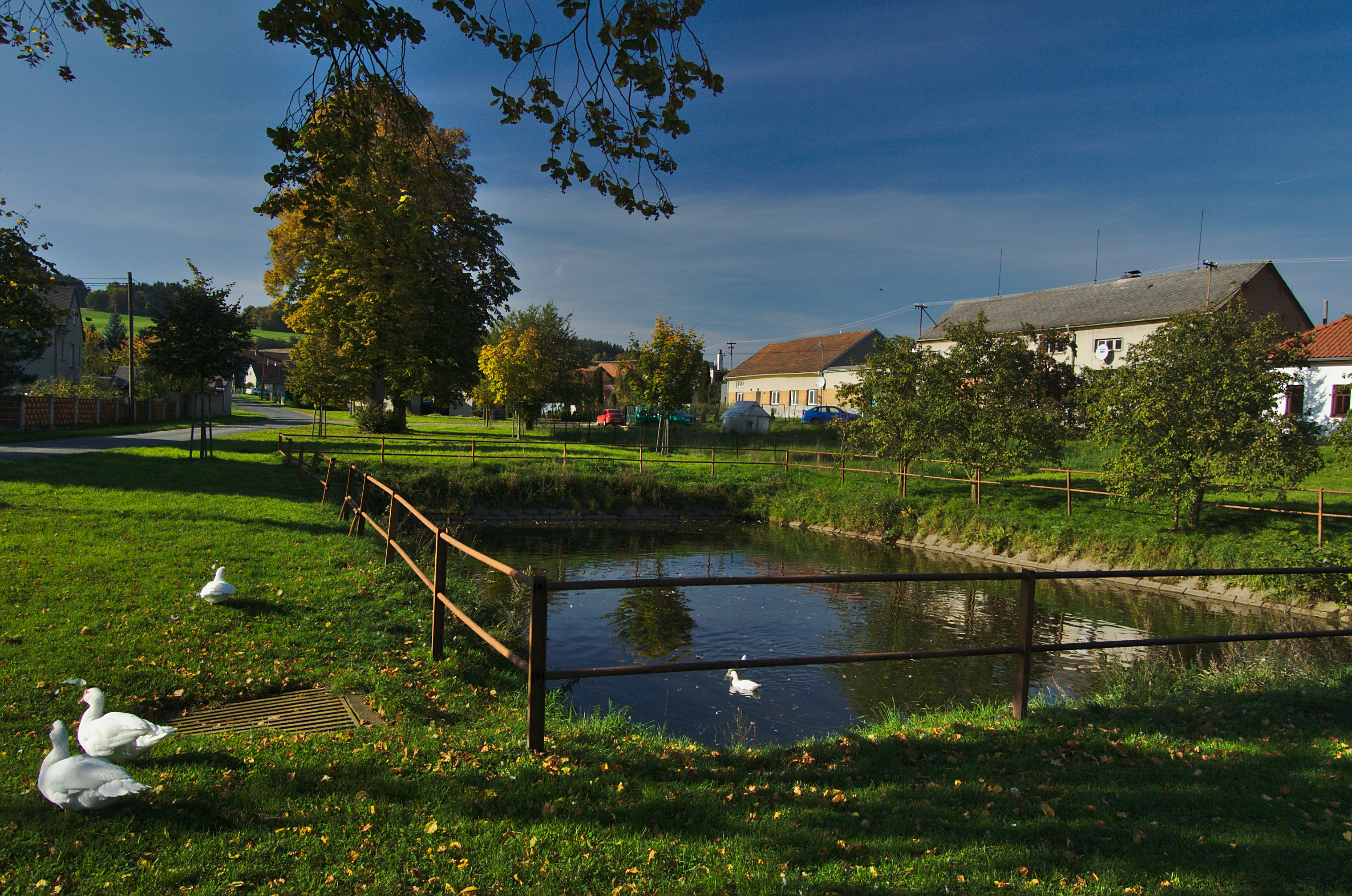 Rybník na návsi, Klužínek, Hvozd, okres Prostějov